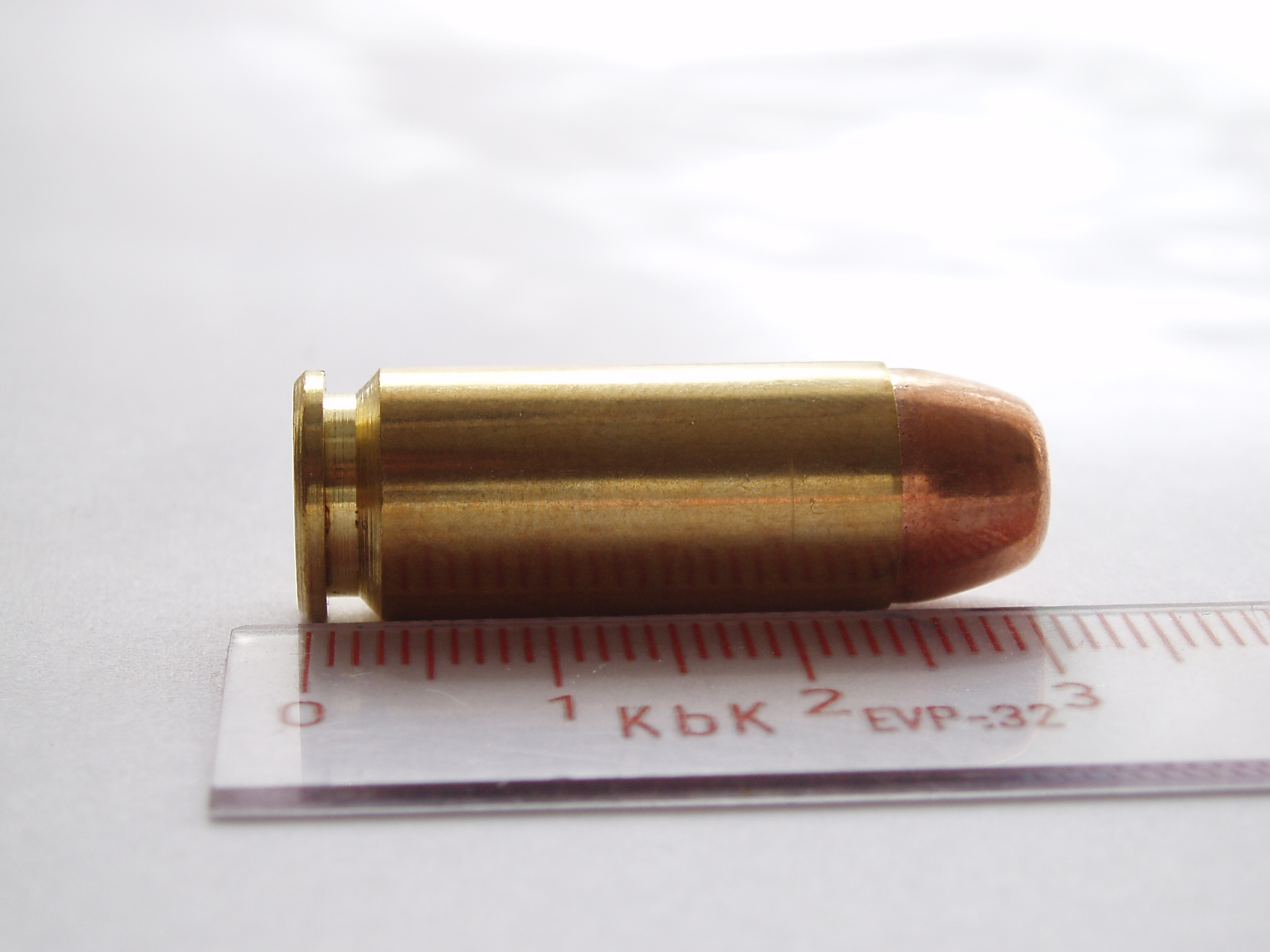 10MM AUTO pistol cartrdige. FMJ bullet.